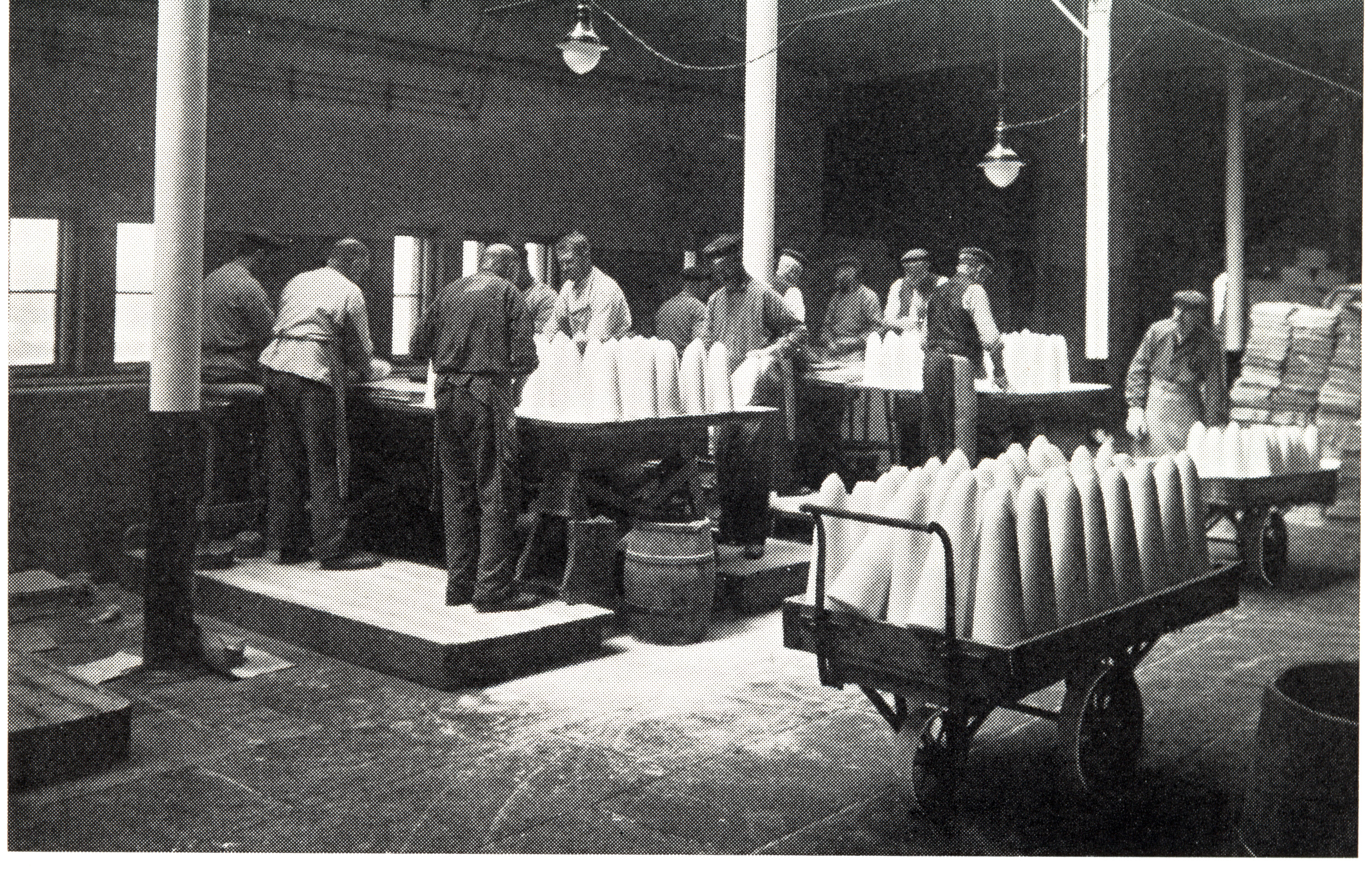 Paketering av sockertoppar. Carnegieska sockerbruket, Göteborg